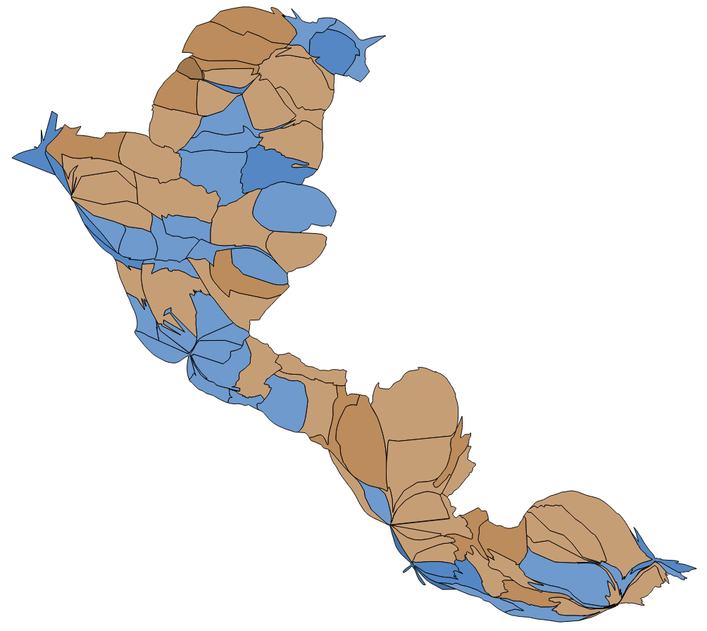 顏色對照表